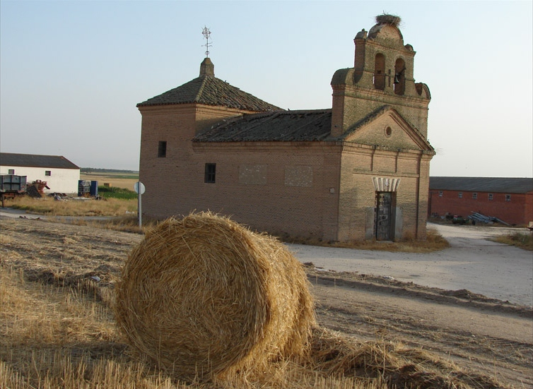 Ermita de Cabezas de Alambre, Castilla y León, España.